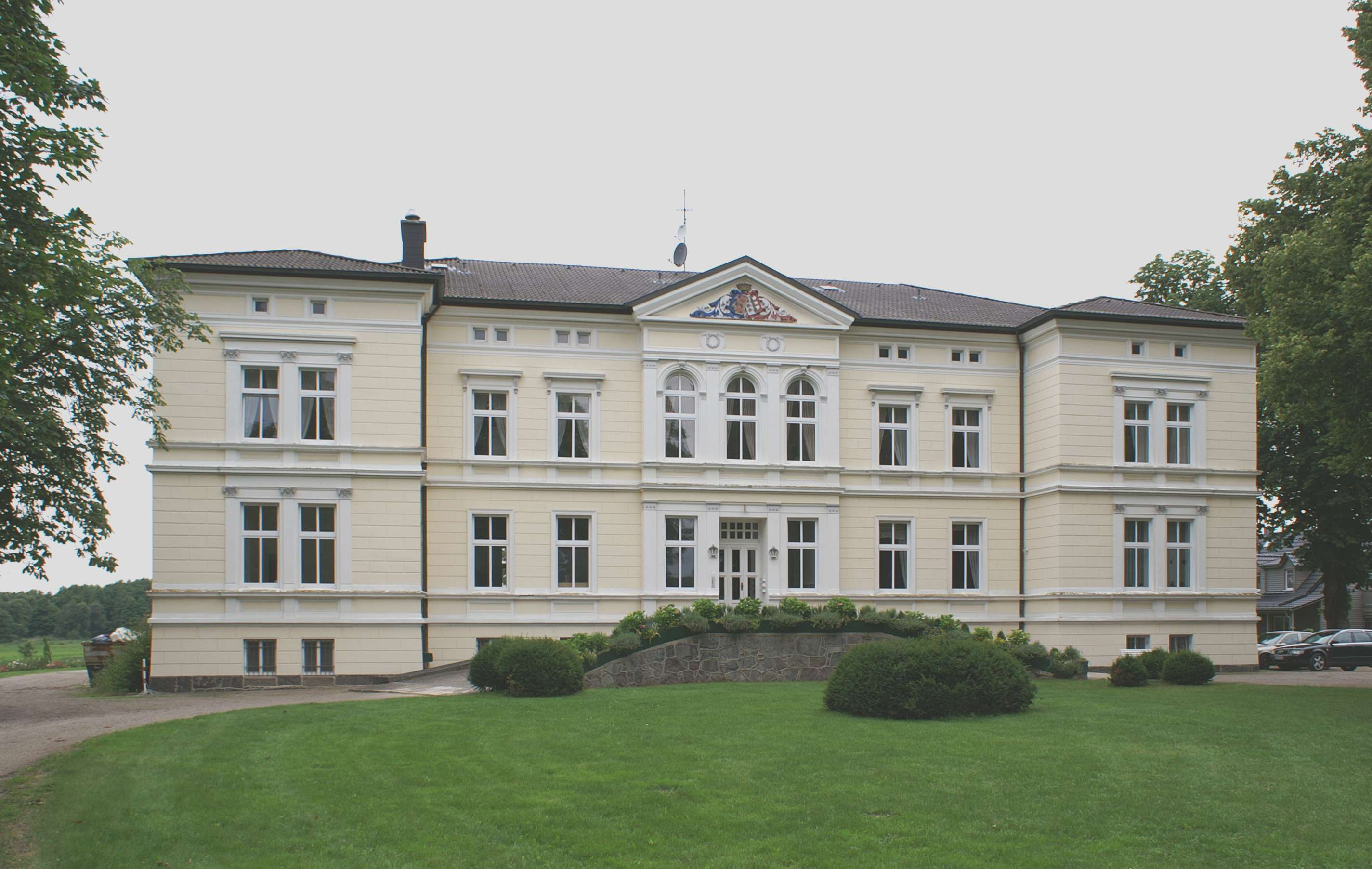 Vanselow - Landkreis Mecklenburgische Seenplatte - Herrenhaus - Front